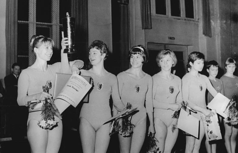 Zentralbild Liebers 20.11.1966 Gera: Turnen - FDGB-Pokal für SC Leipzig. Mit 150,75 Punkten gewann die Frauenriege des SC Leipzig (Foto) am 19.11.1966 in Gera das Finale um den FDGB-Pokal im Turnen. vlnr: Ursula Trenzinger, Maria Lichtenstein, Eva Brehme, Gerda Adloff und Maritta Bauerschmidt. Die Messestädter, die mit Ursula Trenzinger, Eva Brehme und Maria Lichtenstein auch in der Einzelwertung in dieser Reihenfolge die ersten drei Plätze belegten, gewannen den FDGB-Pokal bereits 1964 und 1965.